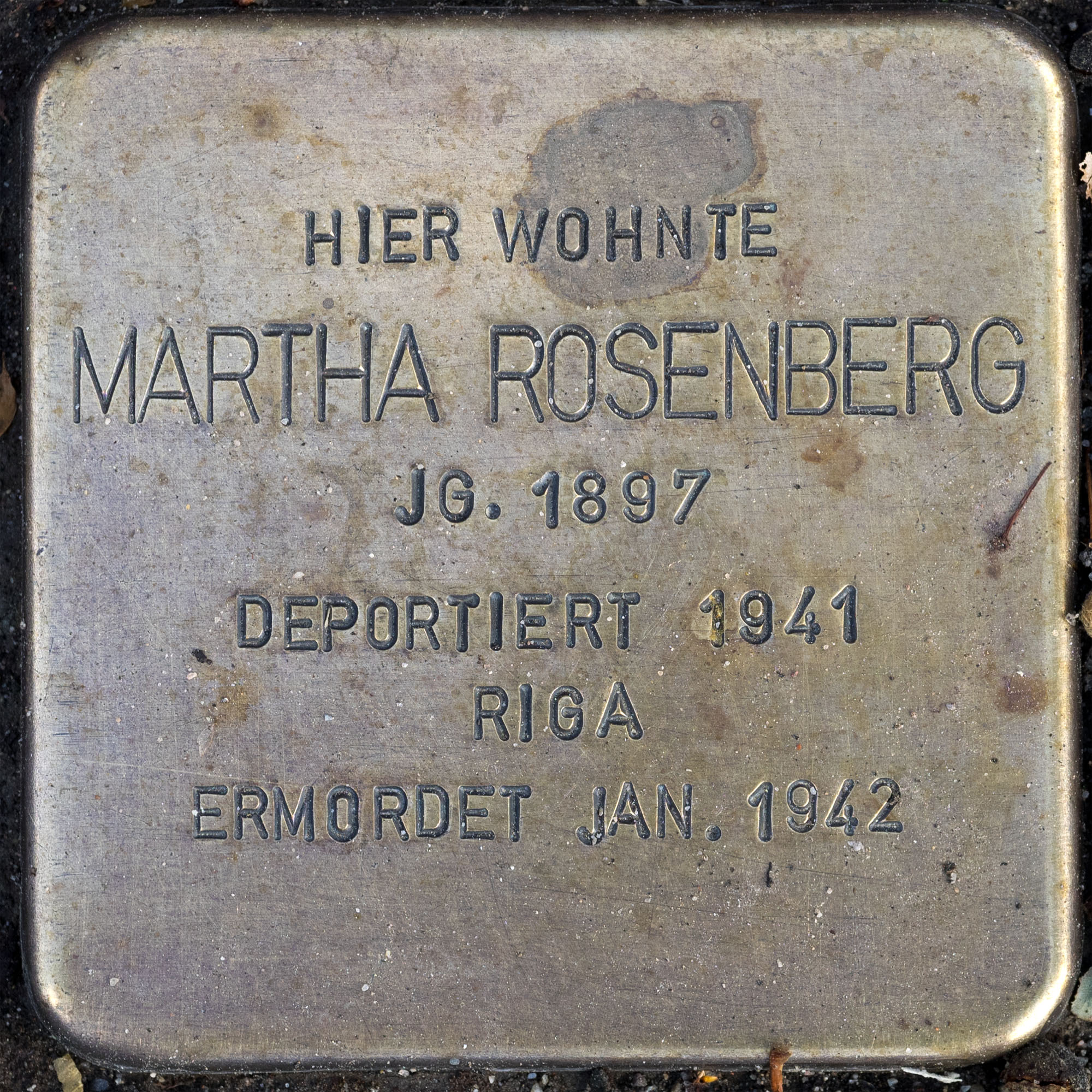 2016 Stolpersteine ToeVo Rosenberg Martha